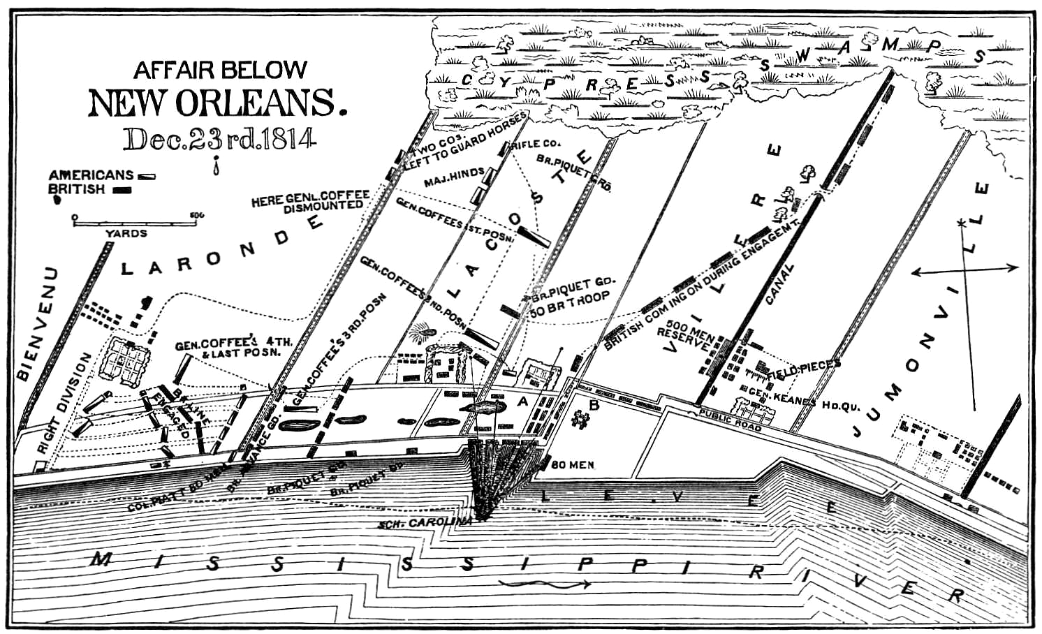 Illustration de Benson John Lossing, de la l'attaque américaine sous le commandement d'Andrew Jackson sur les positions anglaise au soir du 23 décembre 1814 aux niveaux de la plantation Lacoste et Villeré